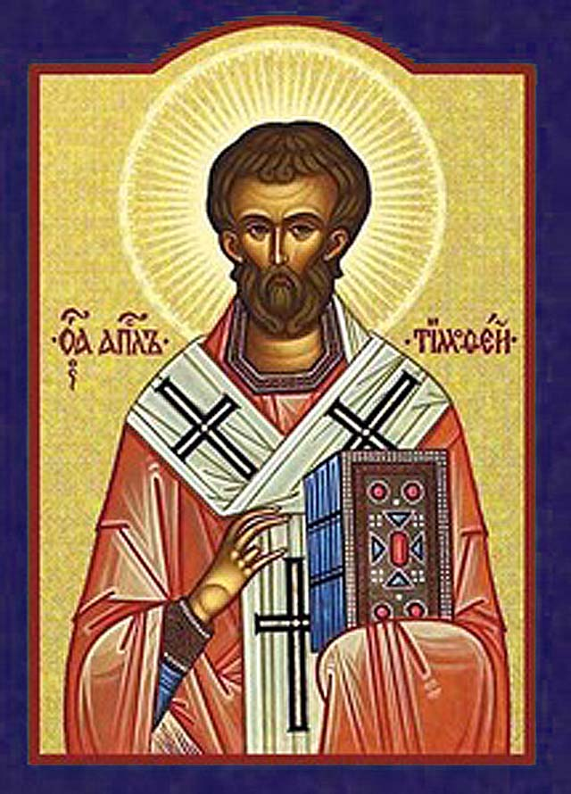 Icône orthodoxe de Césaire, archevêque d'Arles, primat des Gaules